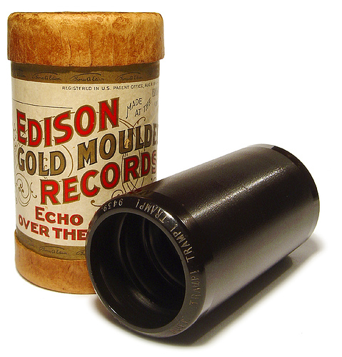 Cilindro de fonógrafo